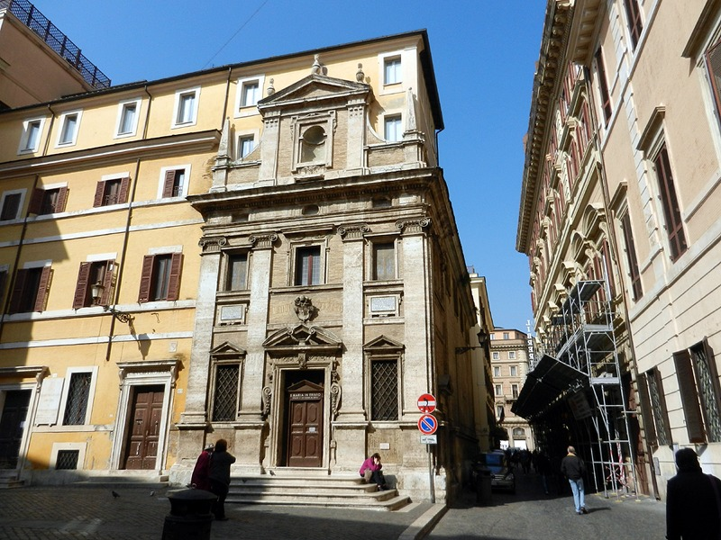 Roma - Chiesa di S. Maria in Trivio